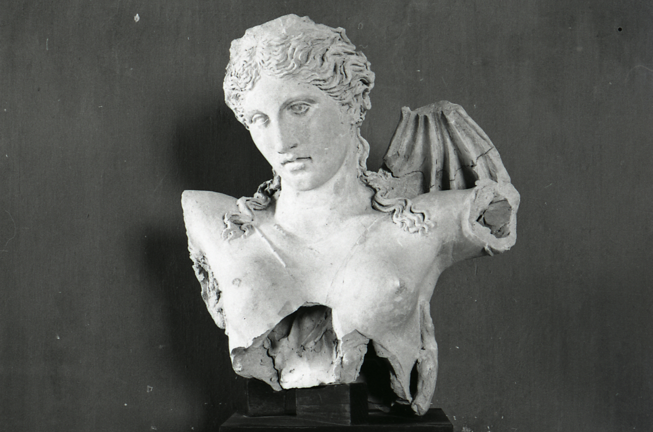 Servizio fotografico : Lucera, 1970 / Paolo Monti. - Strisce: 5, Fotogrammi complessivi: 22 : Negativo b/n, gelatina bromuro d'argento/ pellicola ; 35 mm. - ((I fotogrammi hanno una doppia numerazione. . - Sul portanegativi: Nikmat FP4. - Sul dorso del portanegativi Monti specifica: "Museo.". - Fonte: Agenda di Paolo Monti: Monti - Agenda 1970 (1970), presso Archivio Paolo Monti